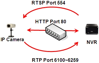 Монгол: Зураг.2 RTP болон RTSP протоколын портын дугаар